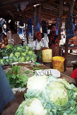 Sambia, Kitwe, Chisokonde Market